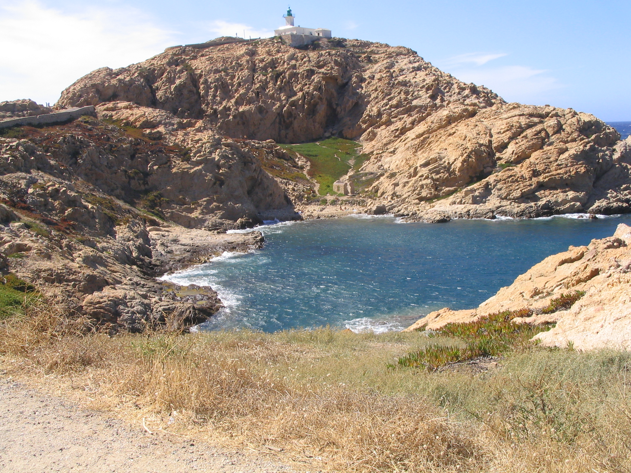 Vue du Phare de l'île Rousse